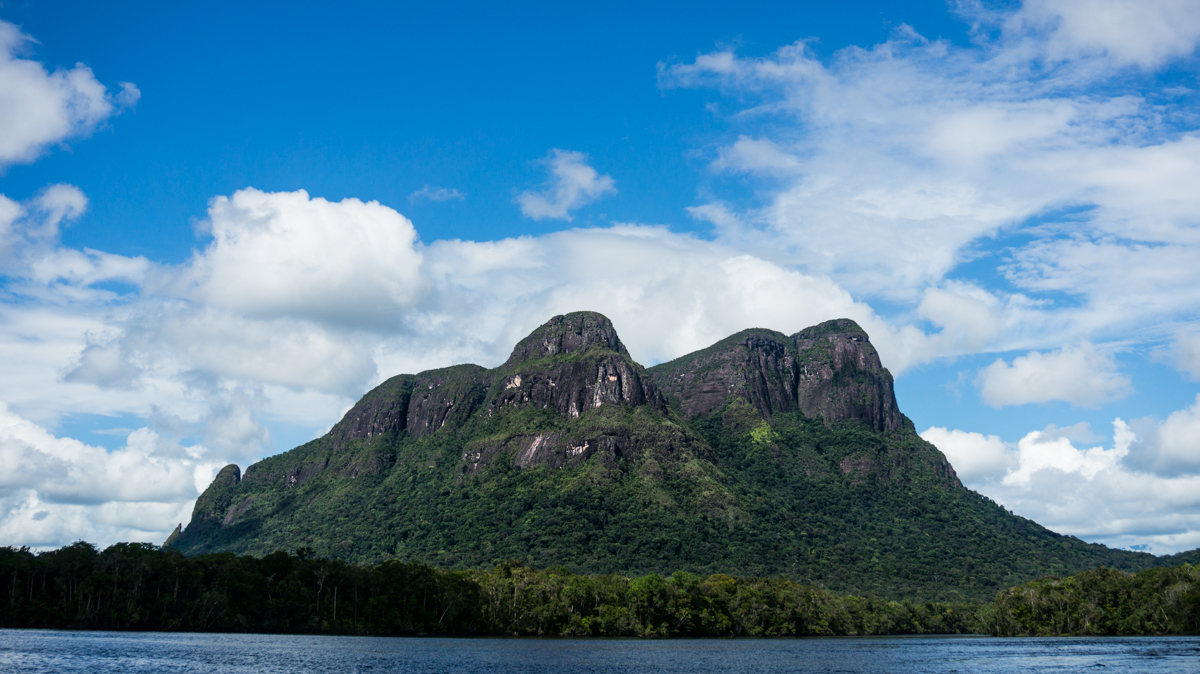 Wahari, el Indio cuidador del Cerro Autana en el Estado Amazonas, Venezuela.